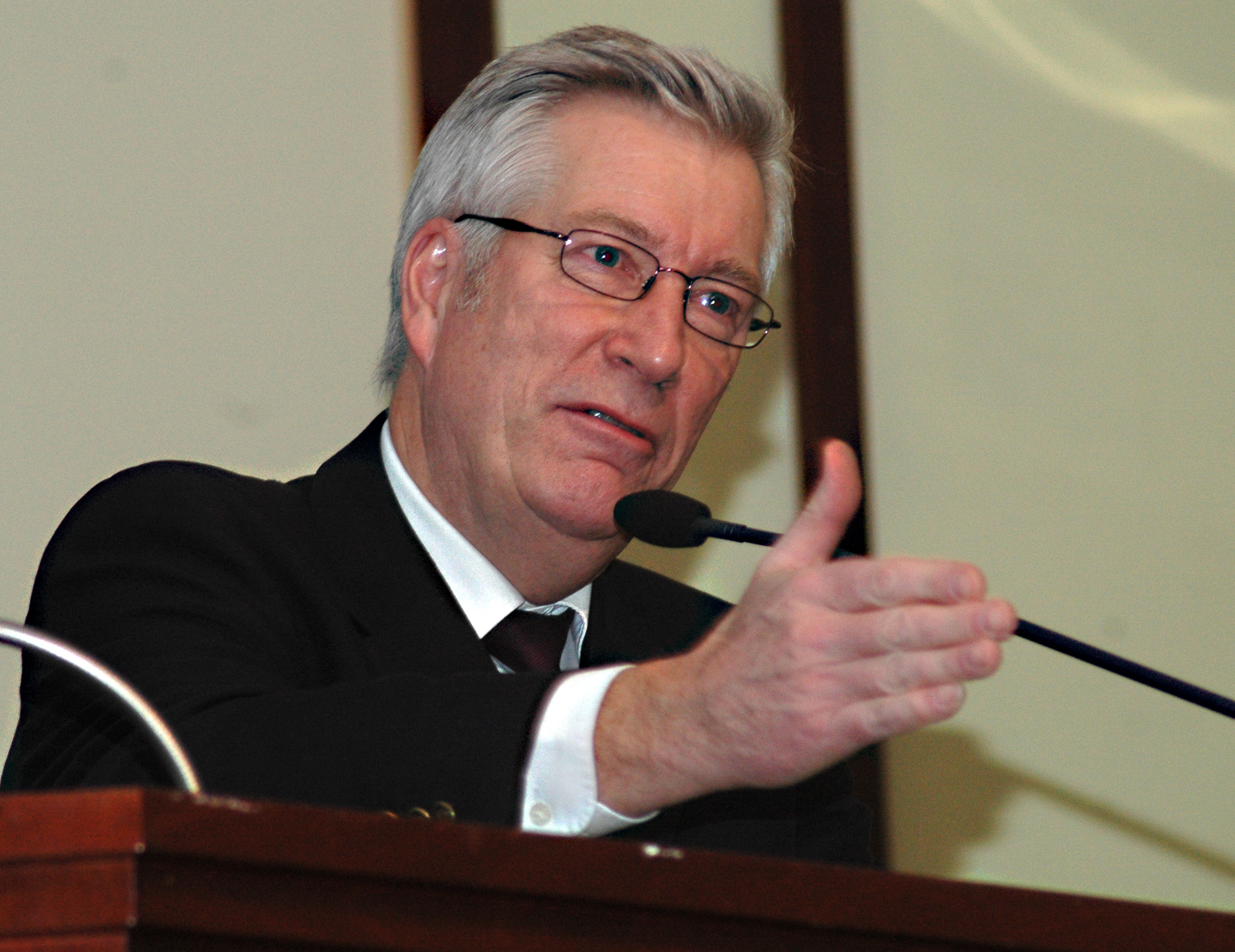 Finansminister Sigbjørn Johnsen på Trøndelagsmøtet Rica 14. januar 2010.